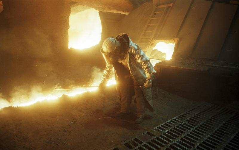 Juni 1988 Duisburg: Thyssen-Stahlwerk, Arbeiter in der Hochofenanlage.